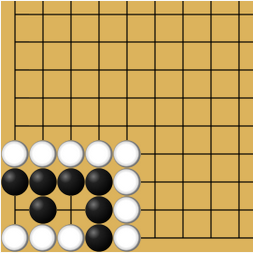 bataille de ko virtuelle au jeu de go, 4 courbés dans le coin